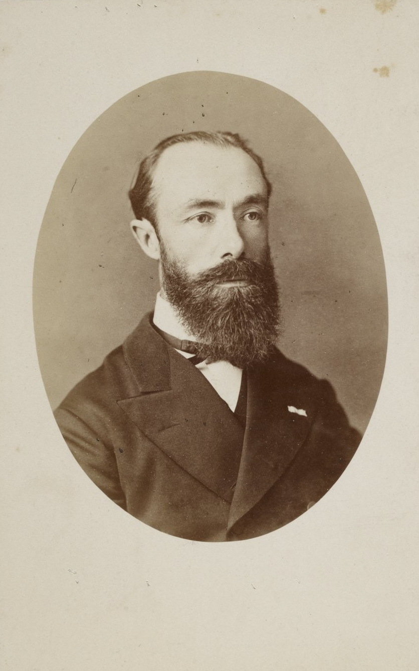 Émile Rivière, photographié par Quinet (1875)